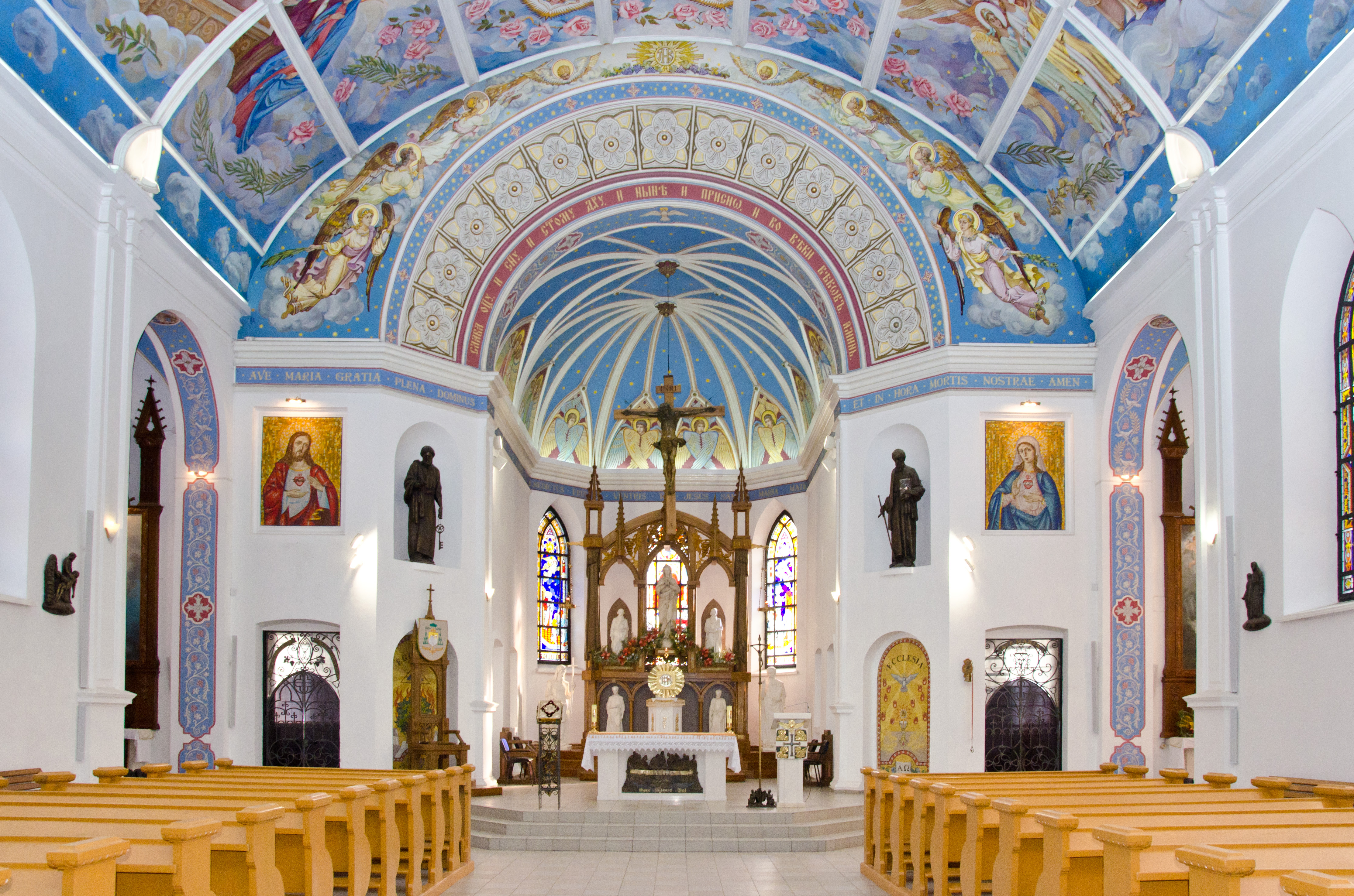 Костел, Харків, вул. Гоголя, 4